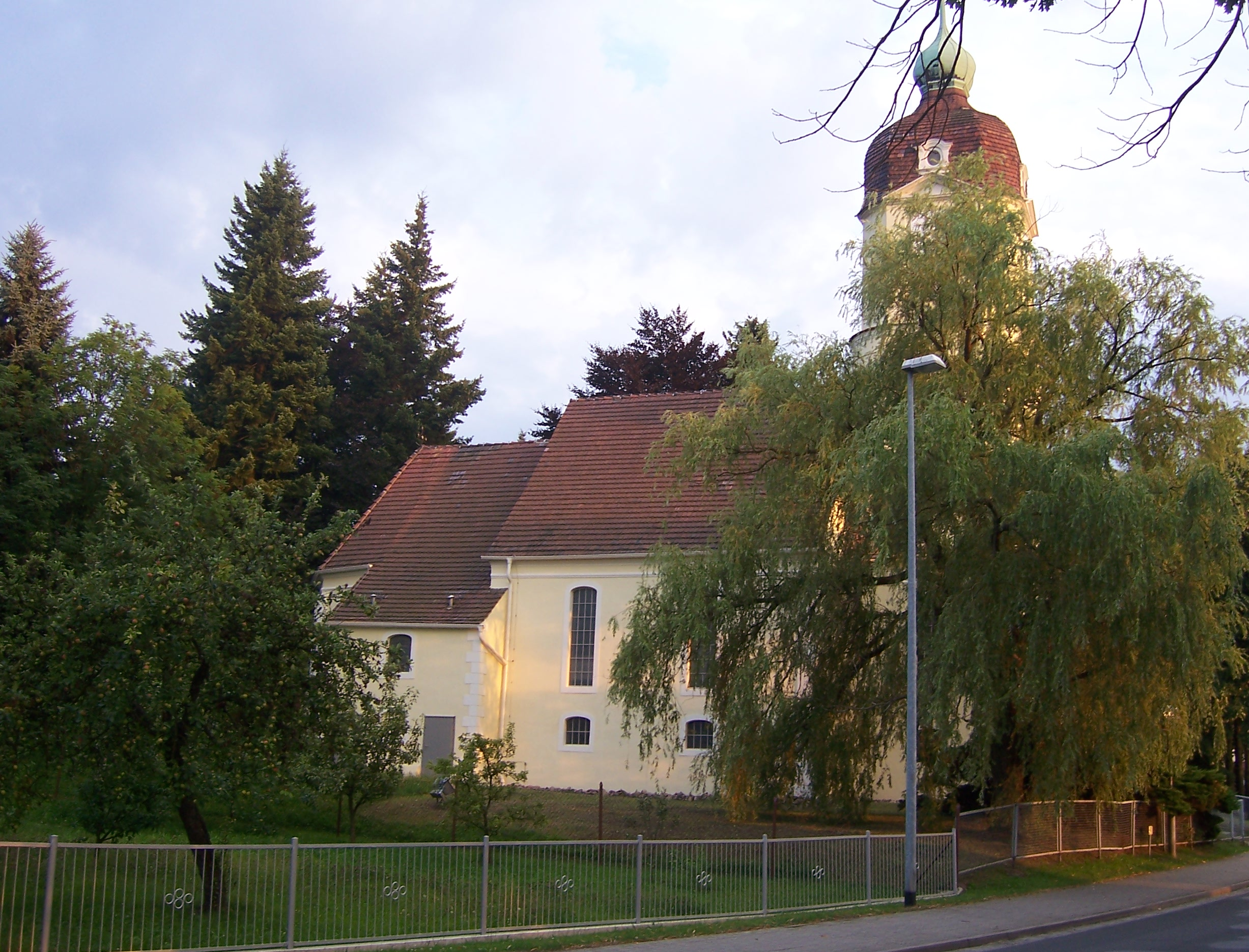 Trinitatiskirche in Gablenz, Landkreis Görlitz Map: 51° 32′ 1″ N, 14° 39′ 49″ E